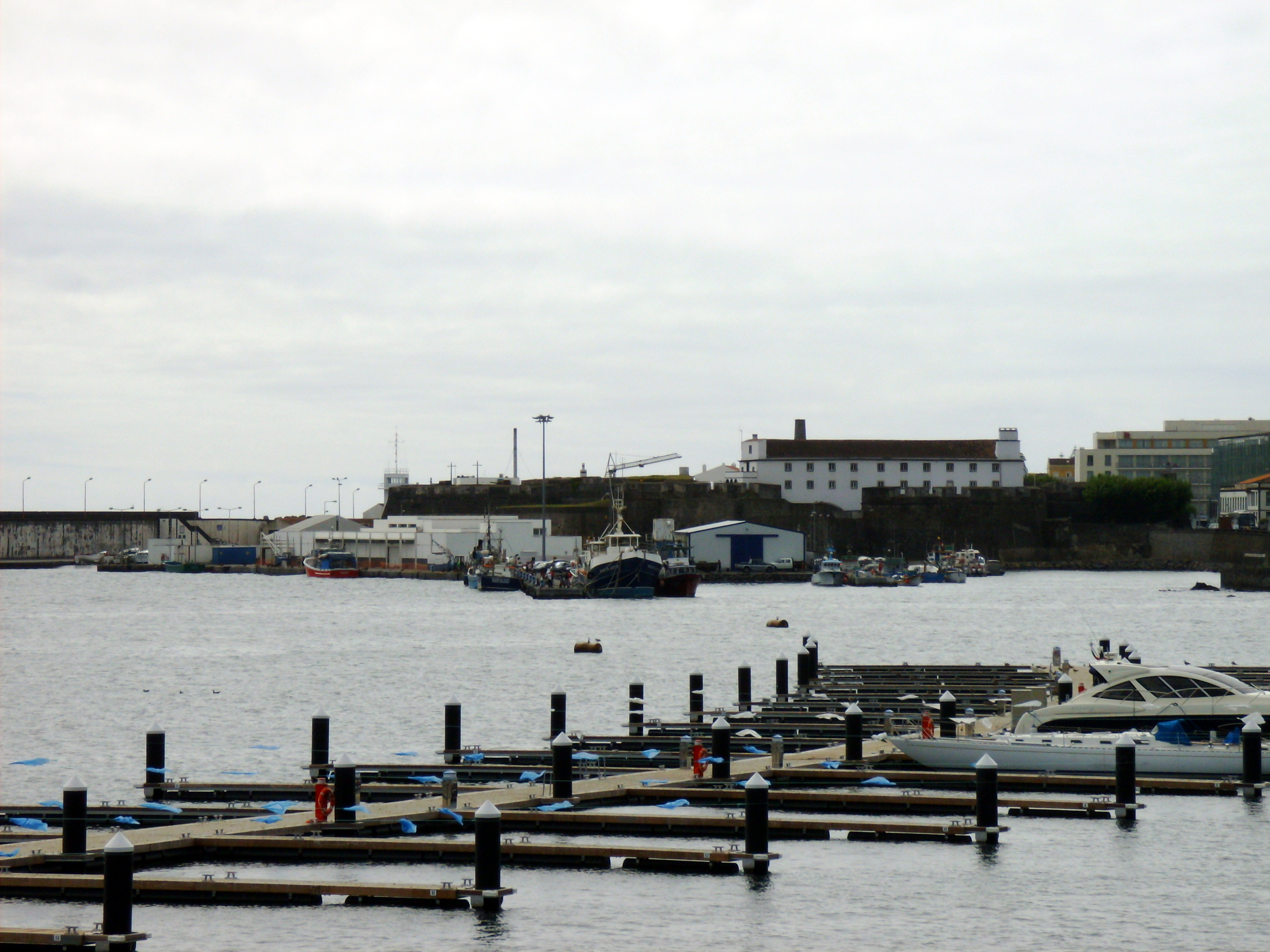 Forte de São Brás, Ponta Delgada, Ilha de São Miguel, Açores: panorâmica.